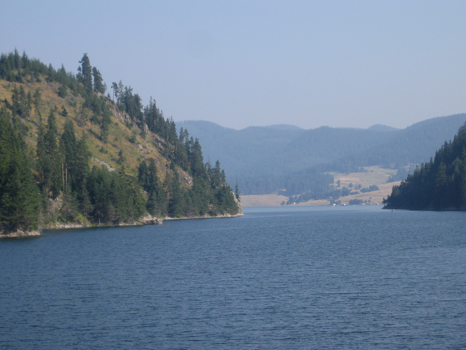 Lac de barrage de Dospat (Bulgarie)